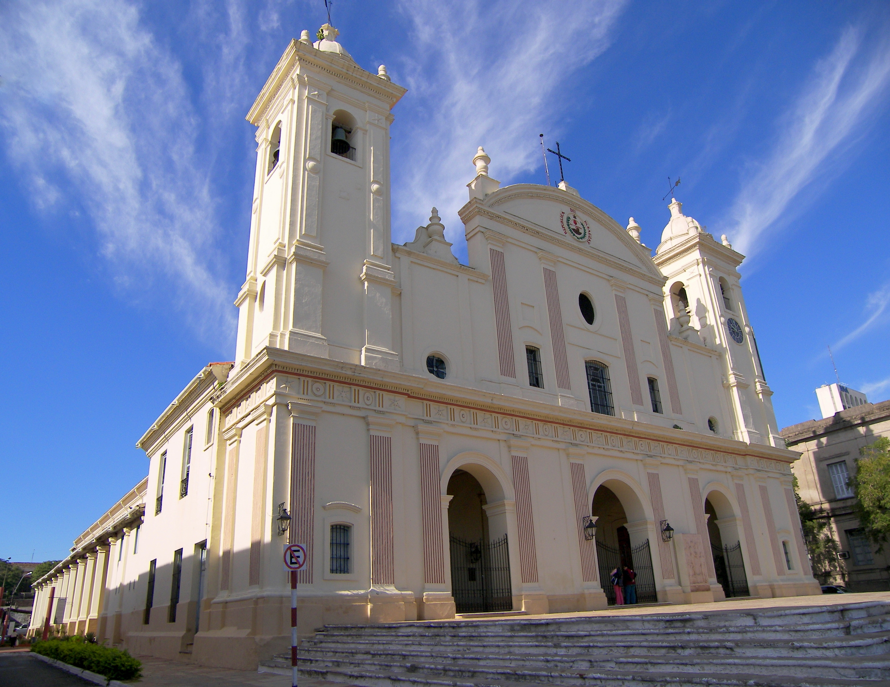 Edificio sede de la catedral metropolitana de Asunción del Paraguay